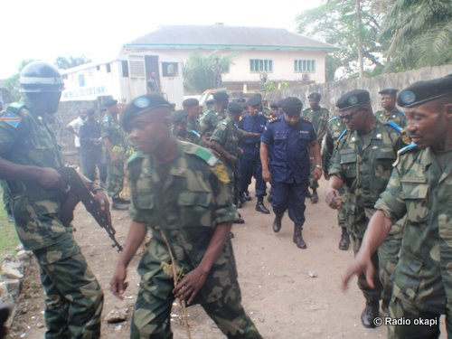 Proces Chebeya à Kinshasa : l'ouverture du procès de Floribert Chebeya à Kinshasa